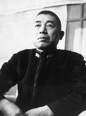 IJN Admiral Takijiro Onishi